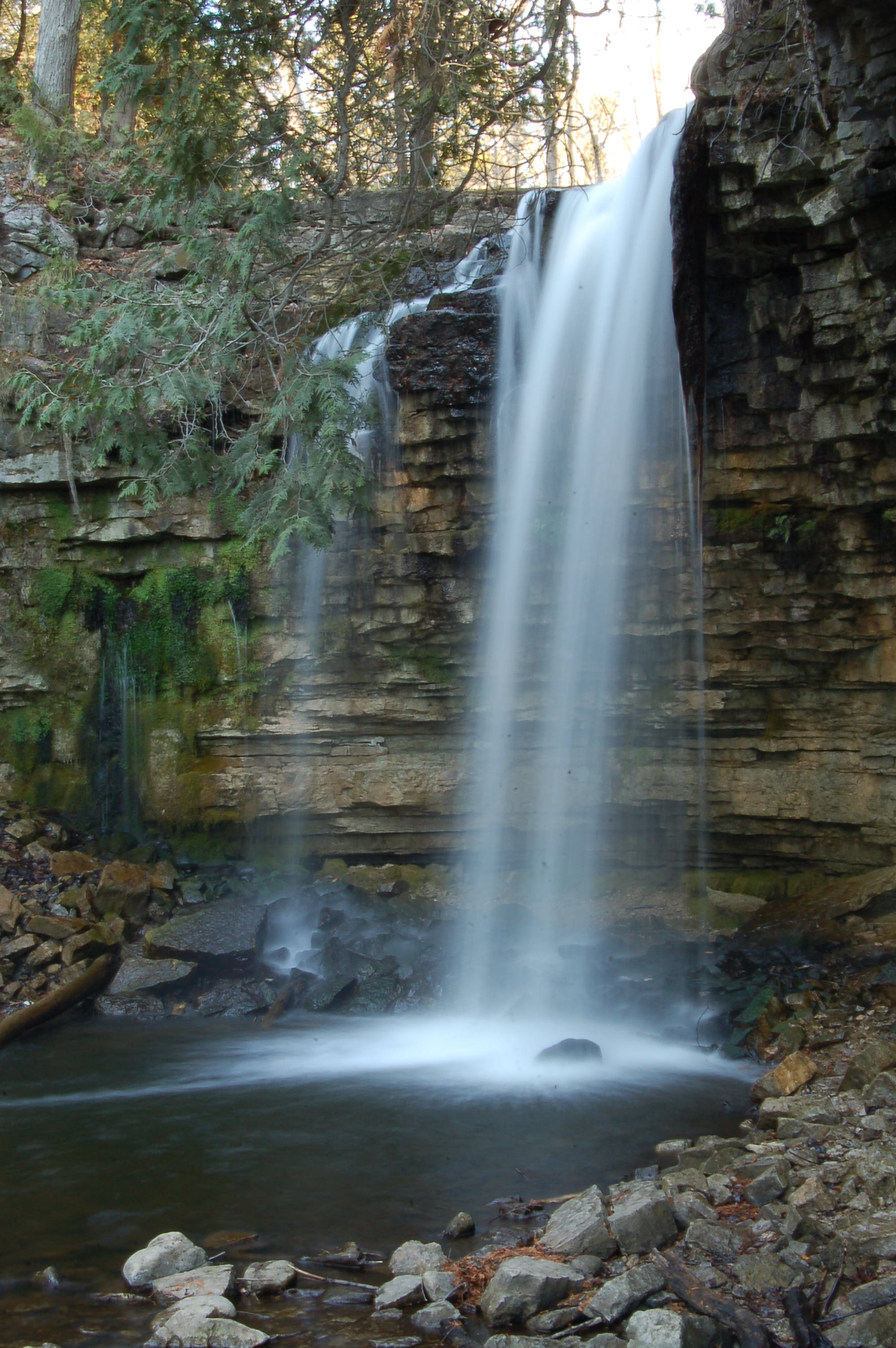 Hilton Falls